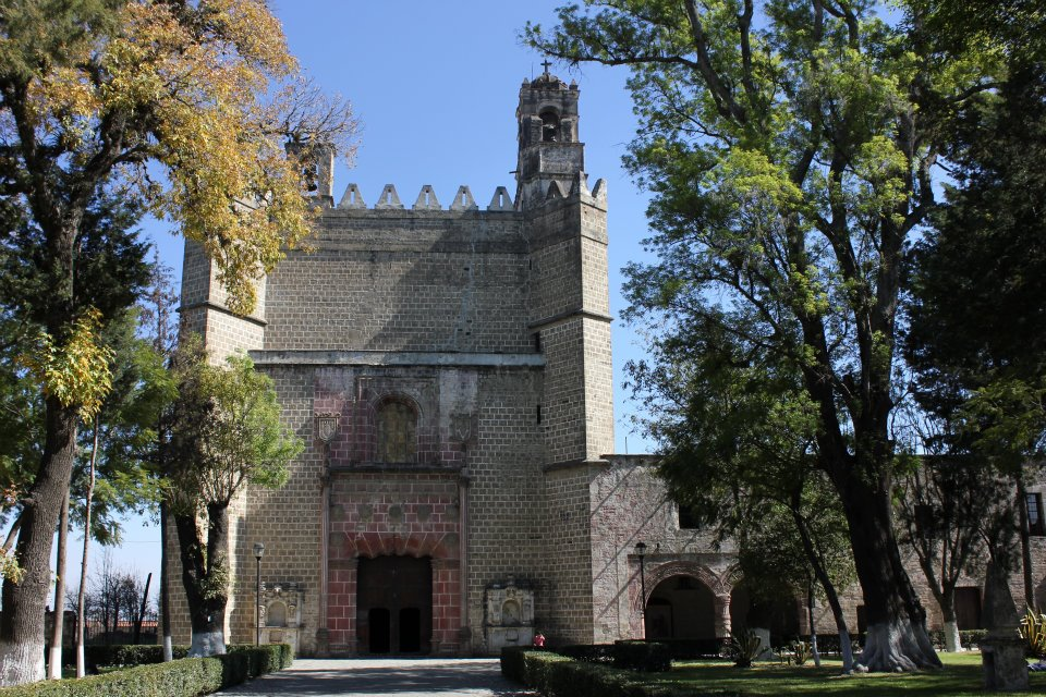 Convento de San Miguel Arcángel en Huejotzingo, Puebla.